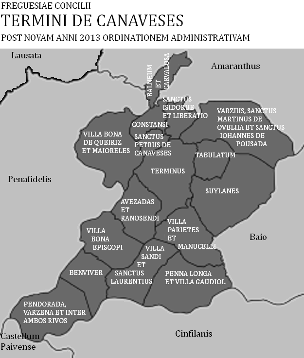 Concilii Termini de Canaveses freguesiae post novam anni 2013 ordinationem administrativam